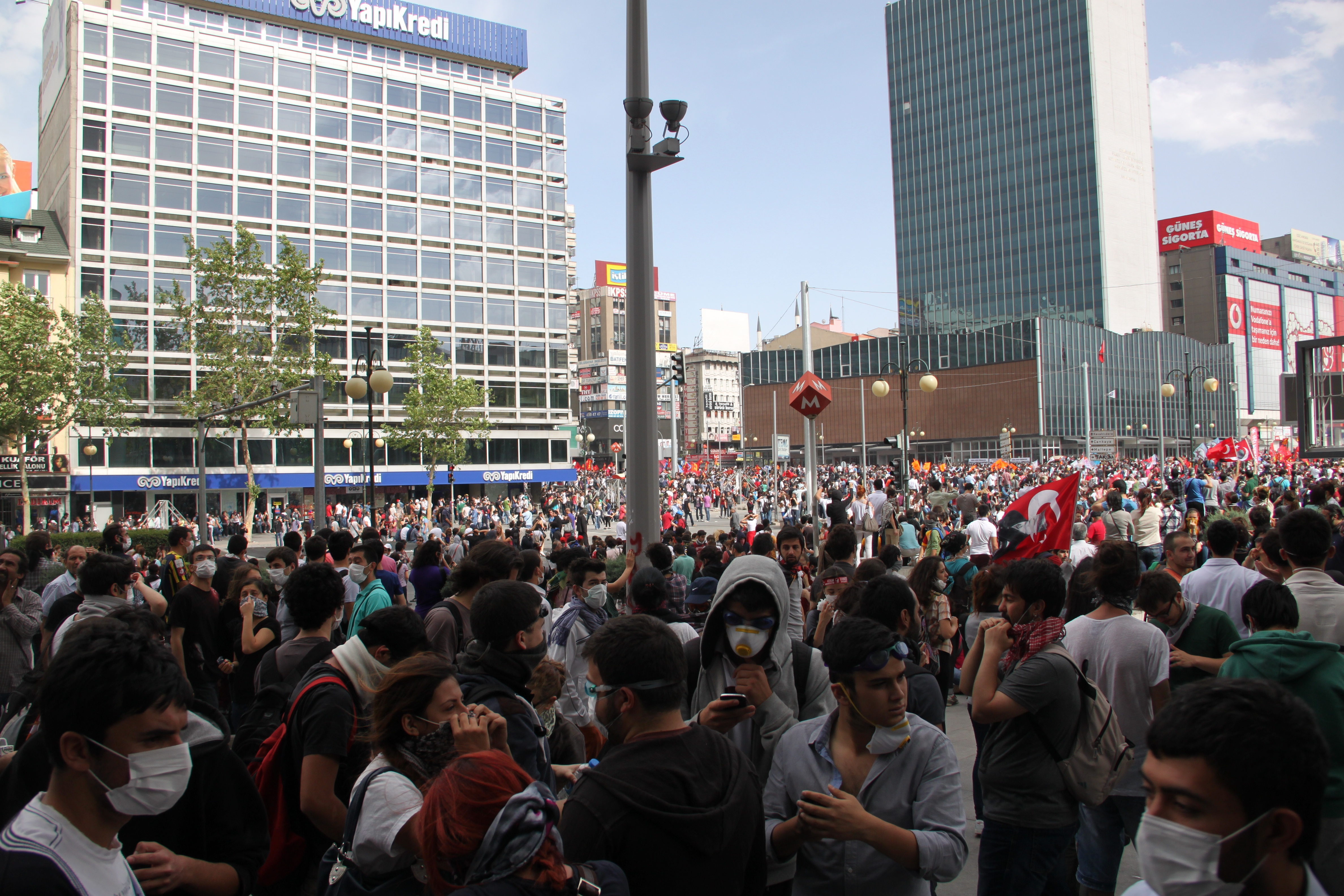 June 2, 2013 Kızılay, Gölbaşı, Ankara, TR Gezi Protests